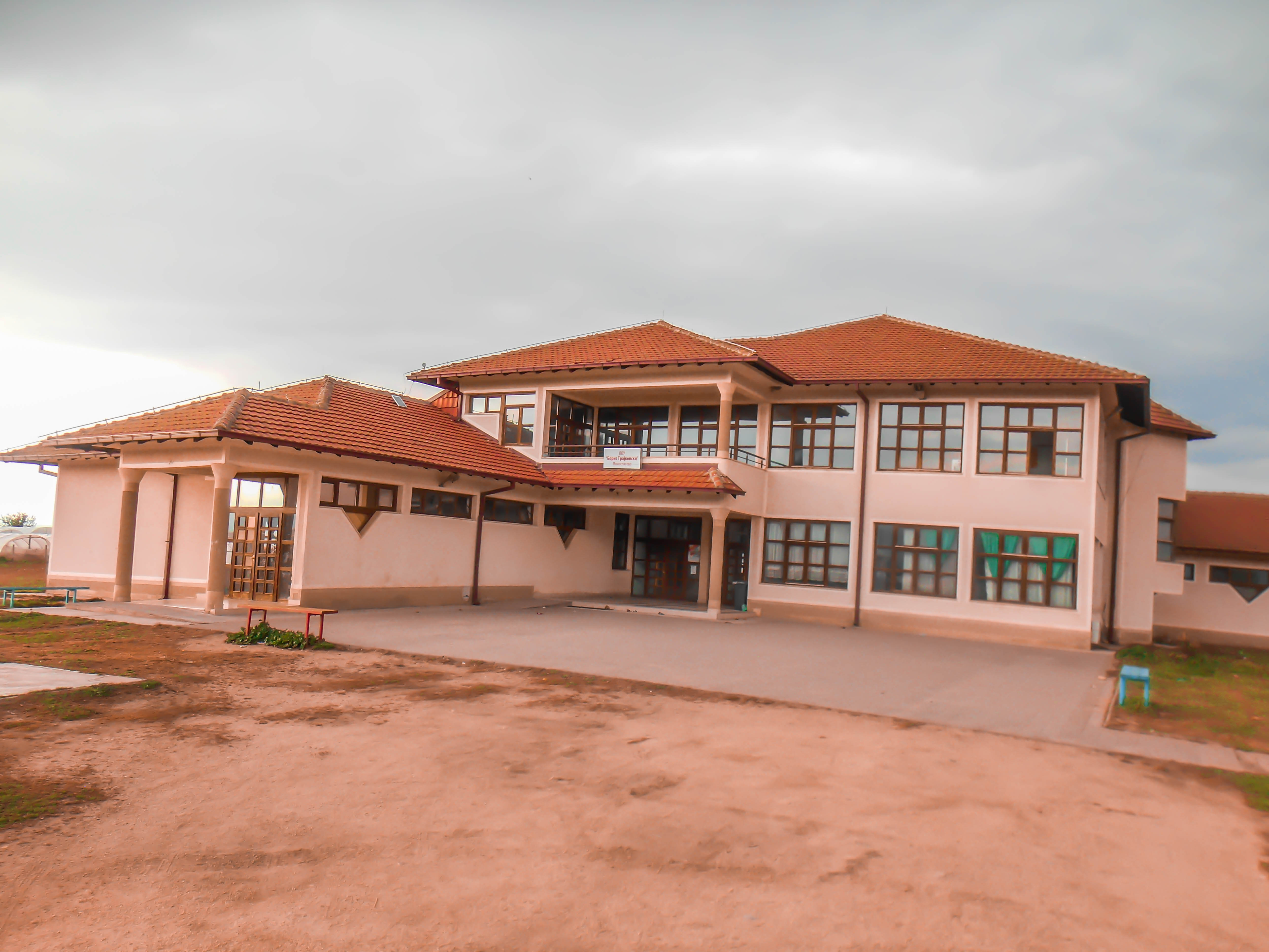 Училиште „Борис Трајковски“ - Моноспитово